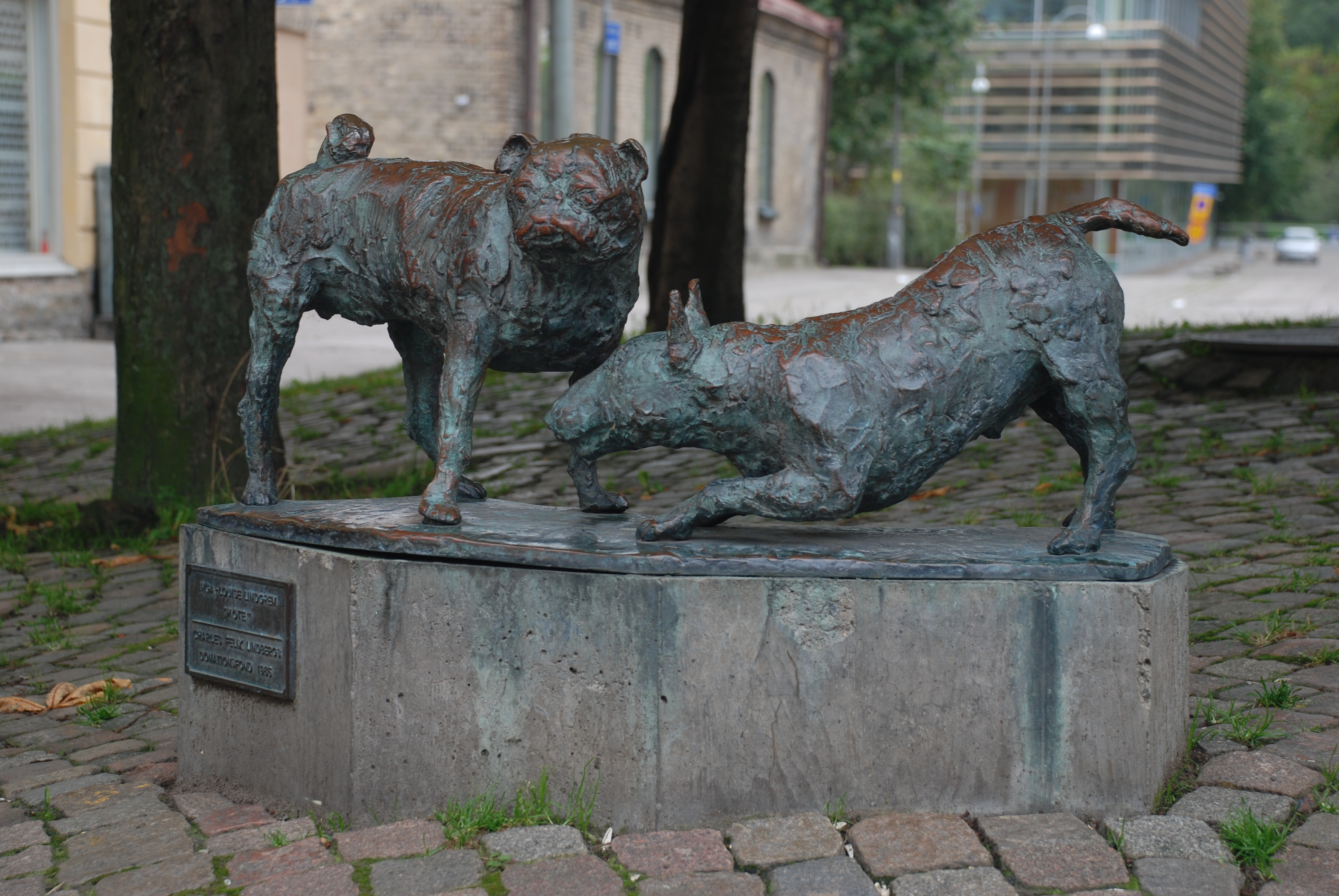 Skulpturen "Möte" av Inga-Louise Lindgren. Placerad vid Kaserntorget i stadsdelen Inom Vallgraven i Göteborg.